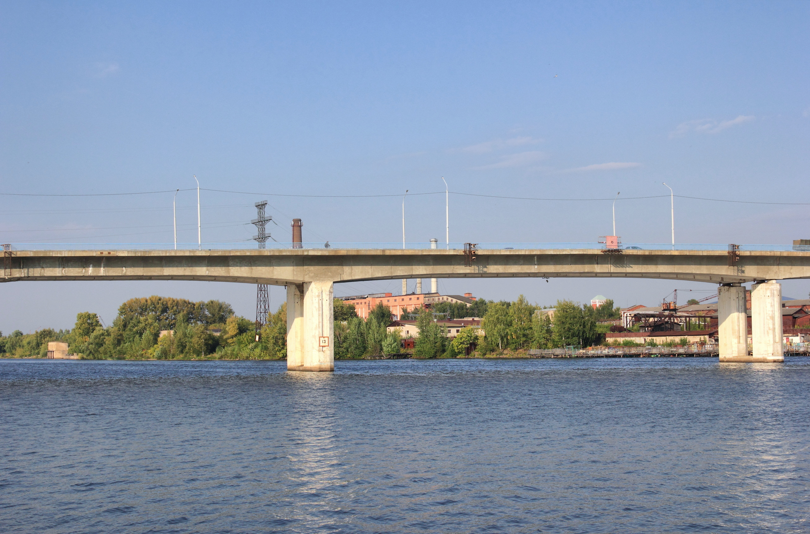 Кострома. Река Кострома. Автомобильный мост 3